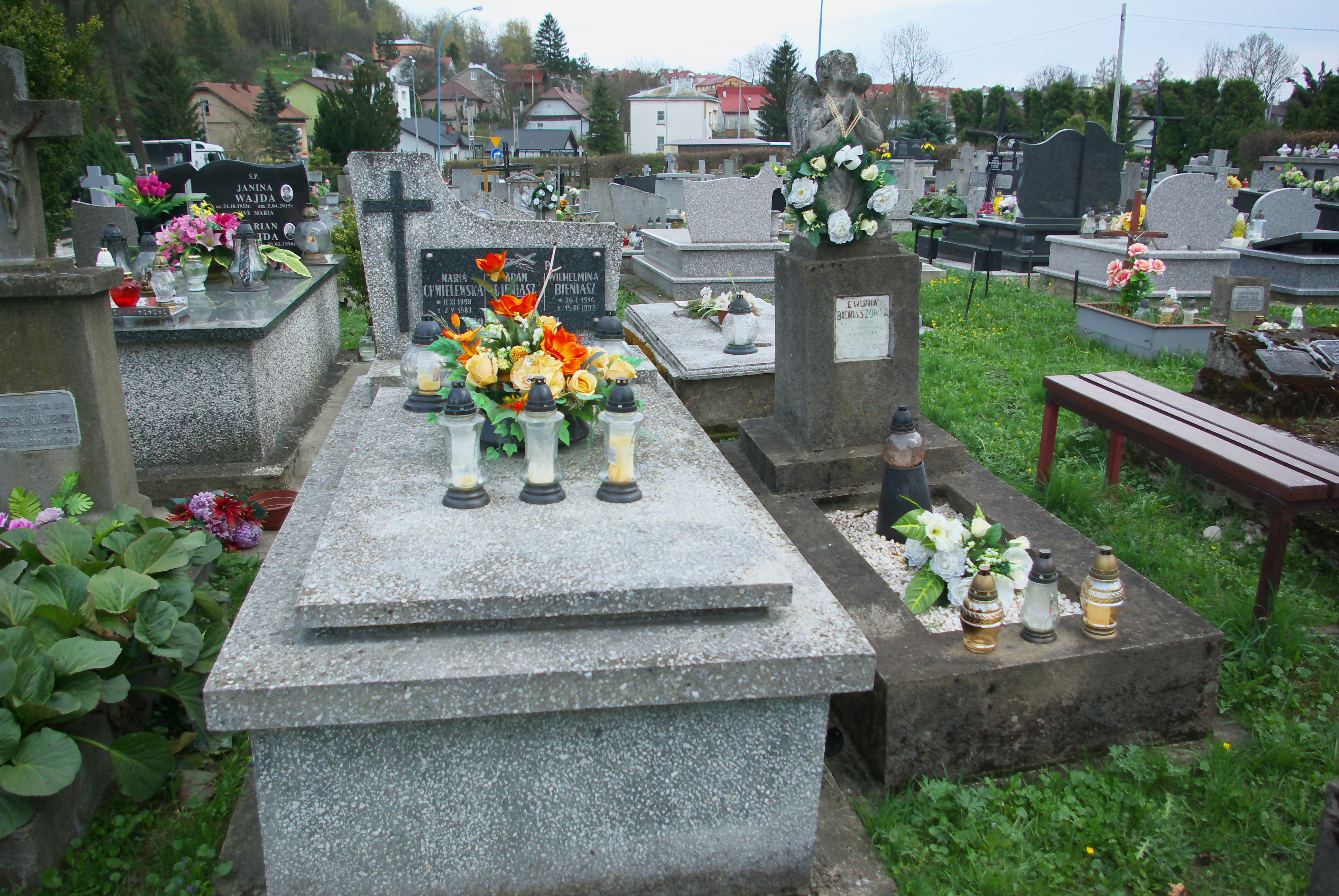 Grobowiec rodziny Bieniaszów (Adam, Wilhelmina, Ewa) na Cmentarzu Centralnym w Sanoku.